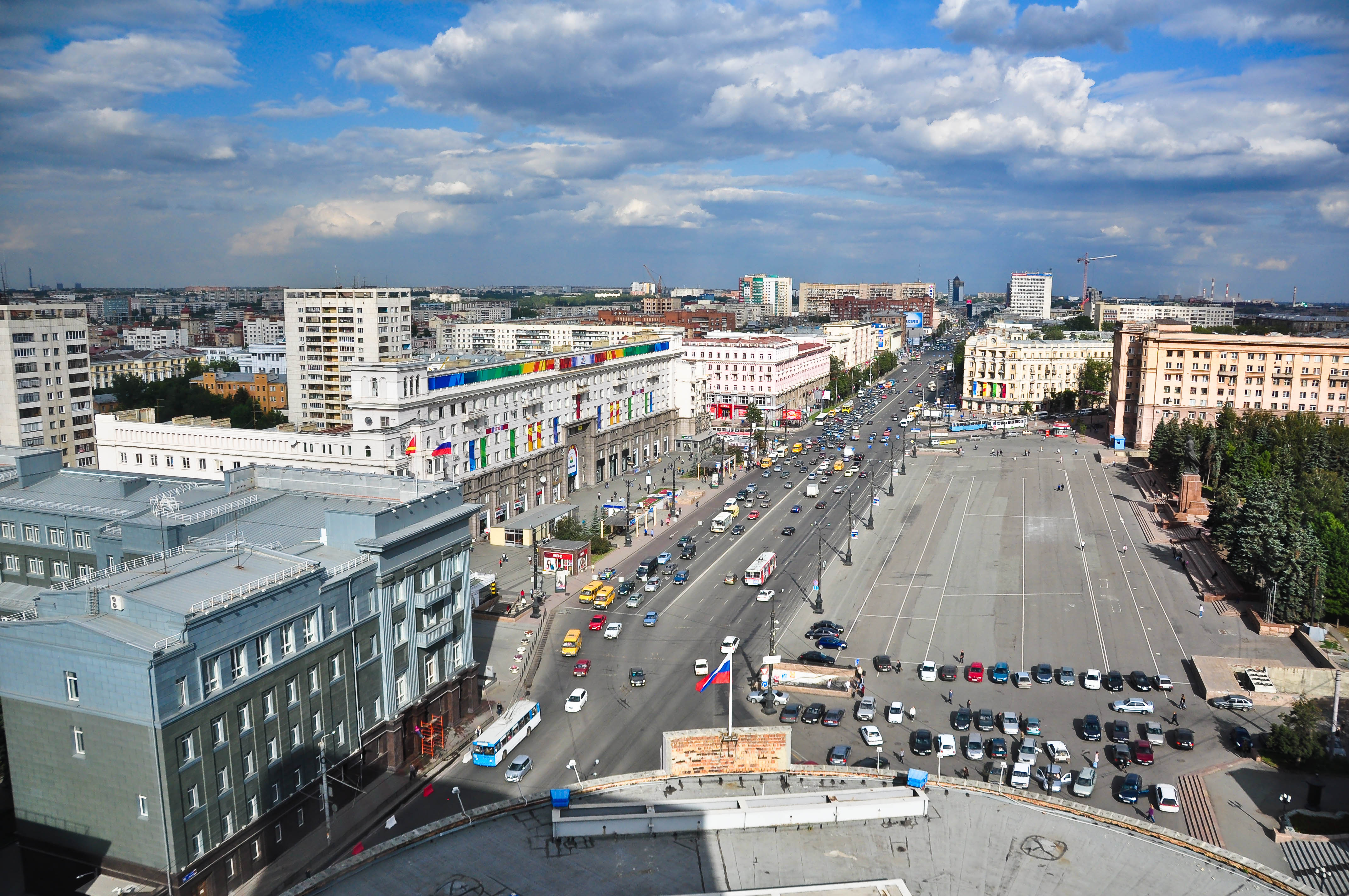 Площадь Революции (вид с ОЦ "Бизнес-Урал")